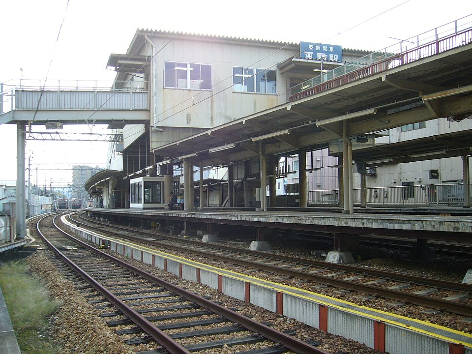 能勢電鉄平野駅